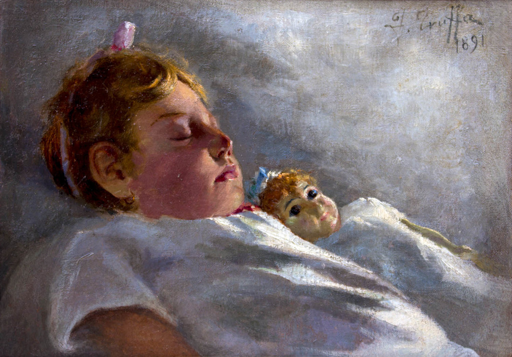 "Bambina che dorme", olio su tela, 30 x 40 cm., coll. privata